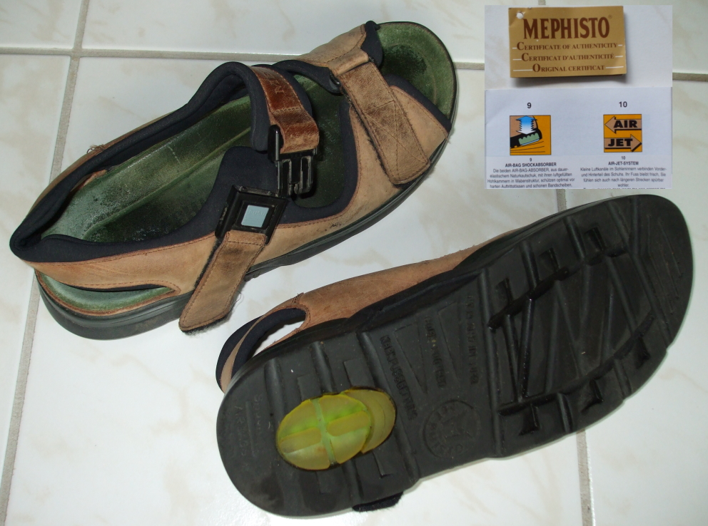 Mephisto Sandalen